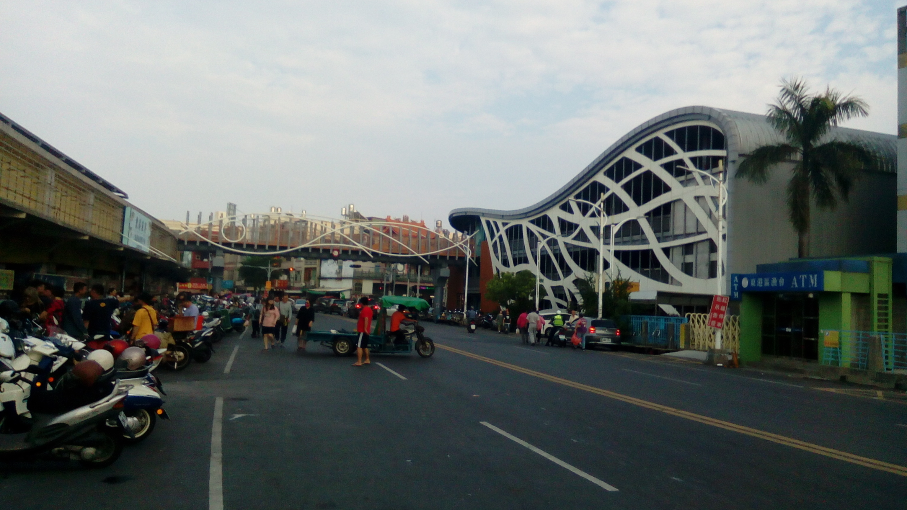 因此路設有東琉線碼頭 往返小琉球的遊客+本地商家及居民 熱鬧非凡